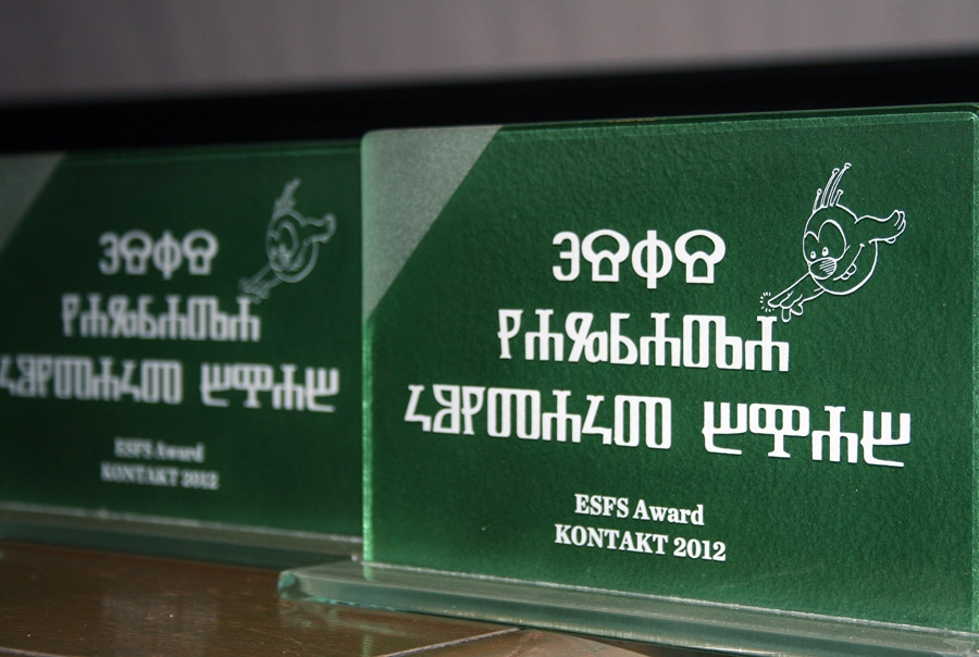 Konvencija Kontakt, koja je spojila 34. SFeraKon i 34. Eurocon u Zagrebu